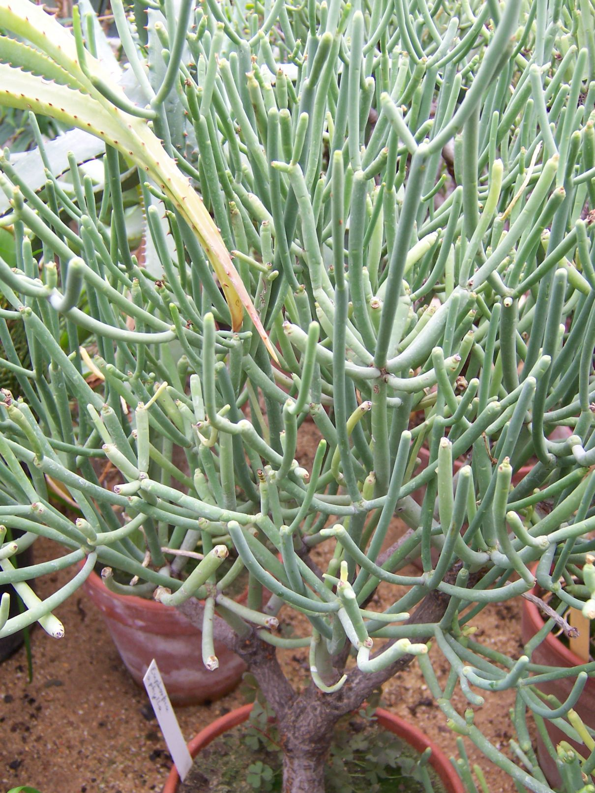 Euphorbia aphylla, habitus